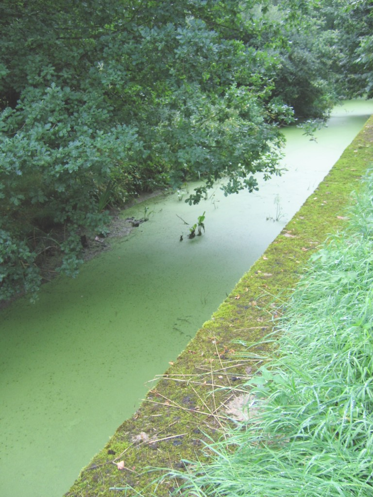 Een door Natuurpunt beheerd stukje Antitankgracht te Haacht, tussen Scharent en de Werchtersesteenweg